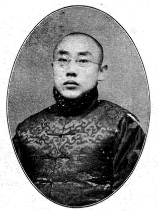 中華民國國會議員